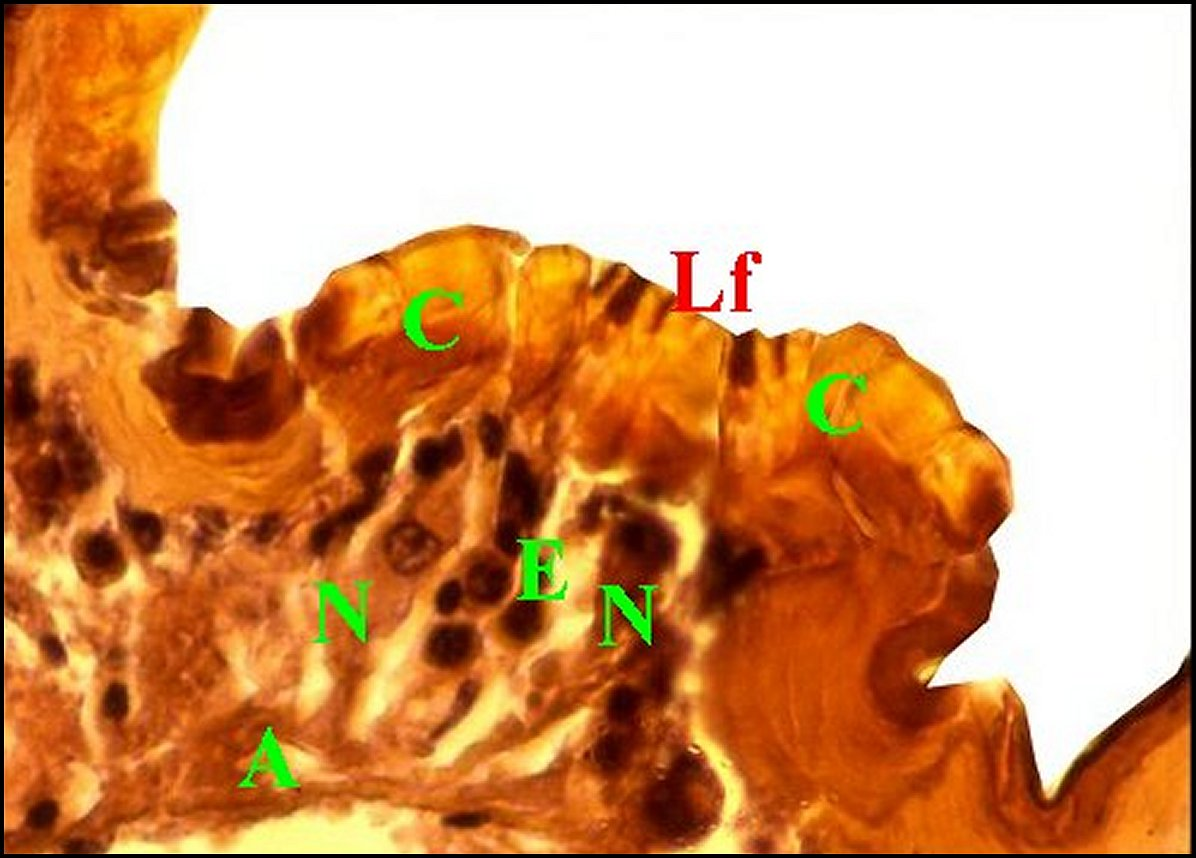 Organe en bourrelet du pédicule de Meta bourneti, coupe histologique.